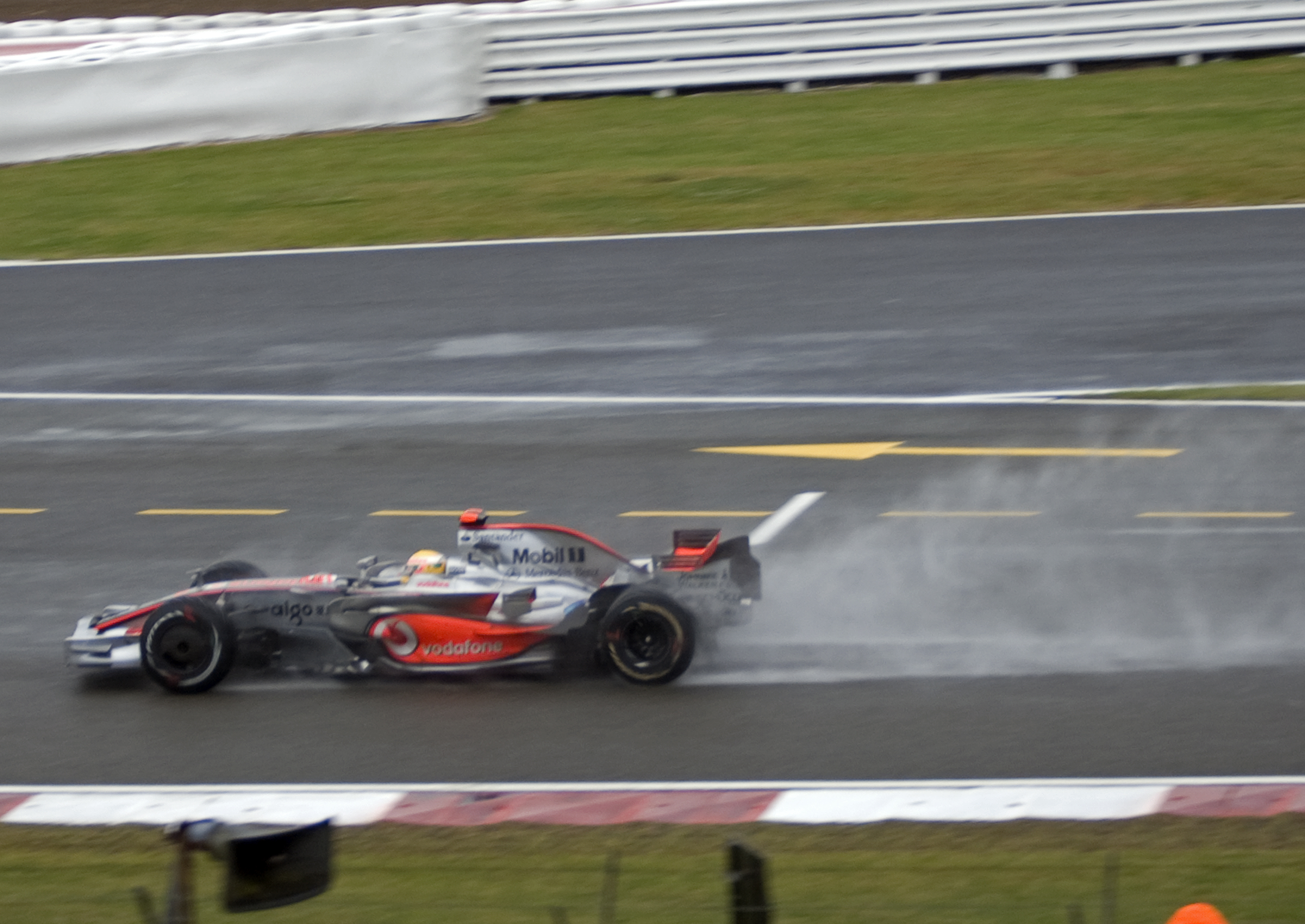 Hamilton Silverstone 2008